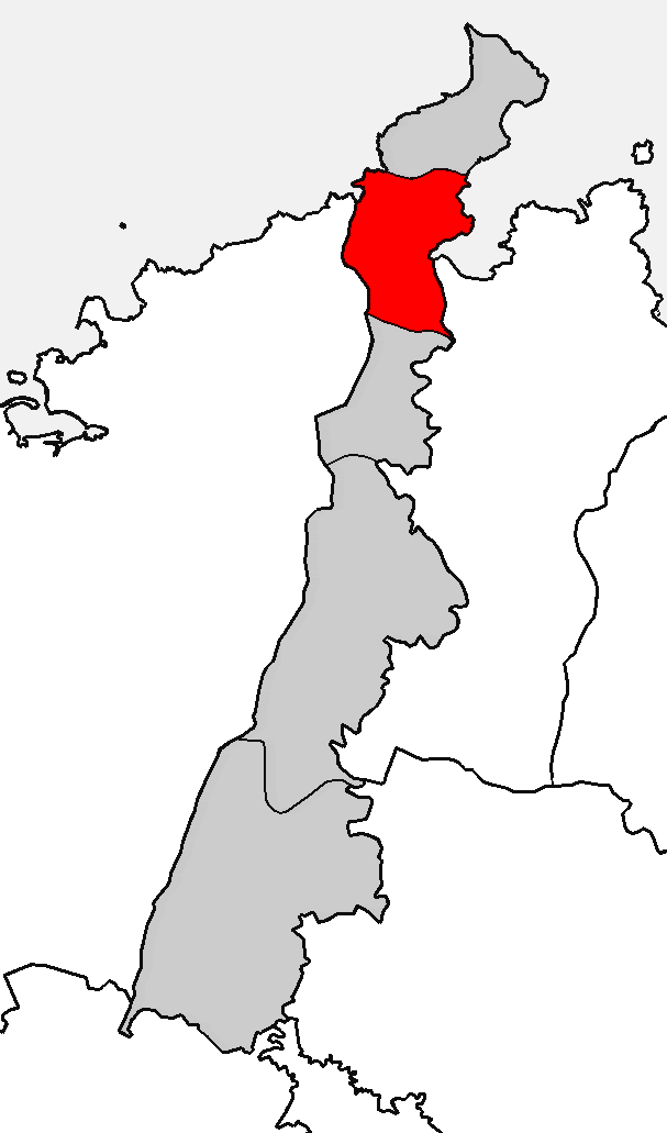 Situación da parroquia de Mogor no concello de Mañón